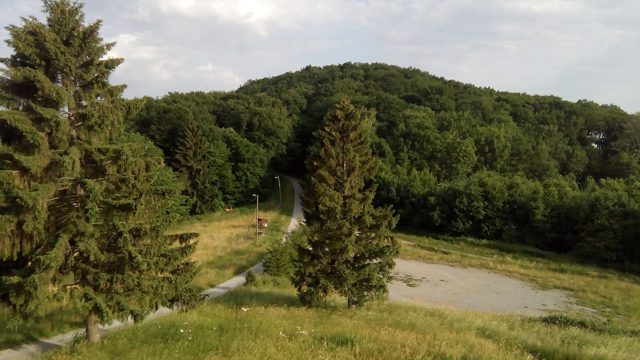 43500, Markovac, Croatia